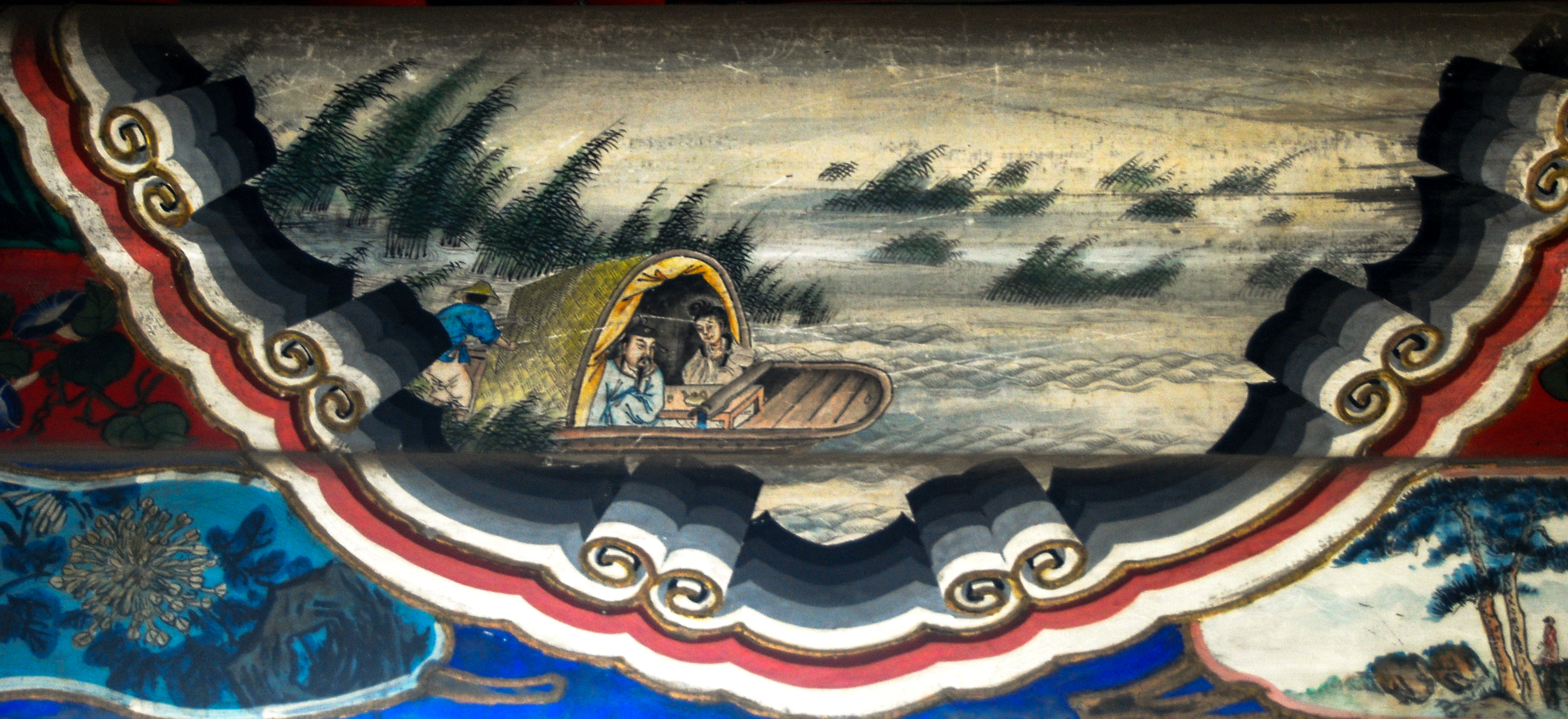 颐和园长廊彩绘：范蠡扁舟